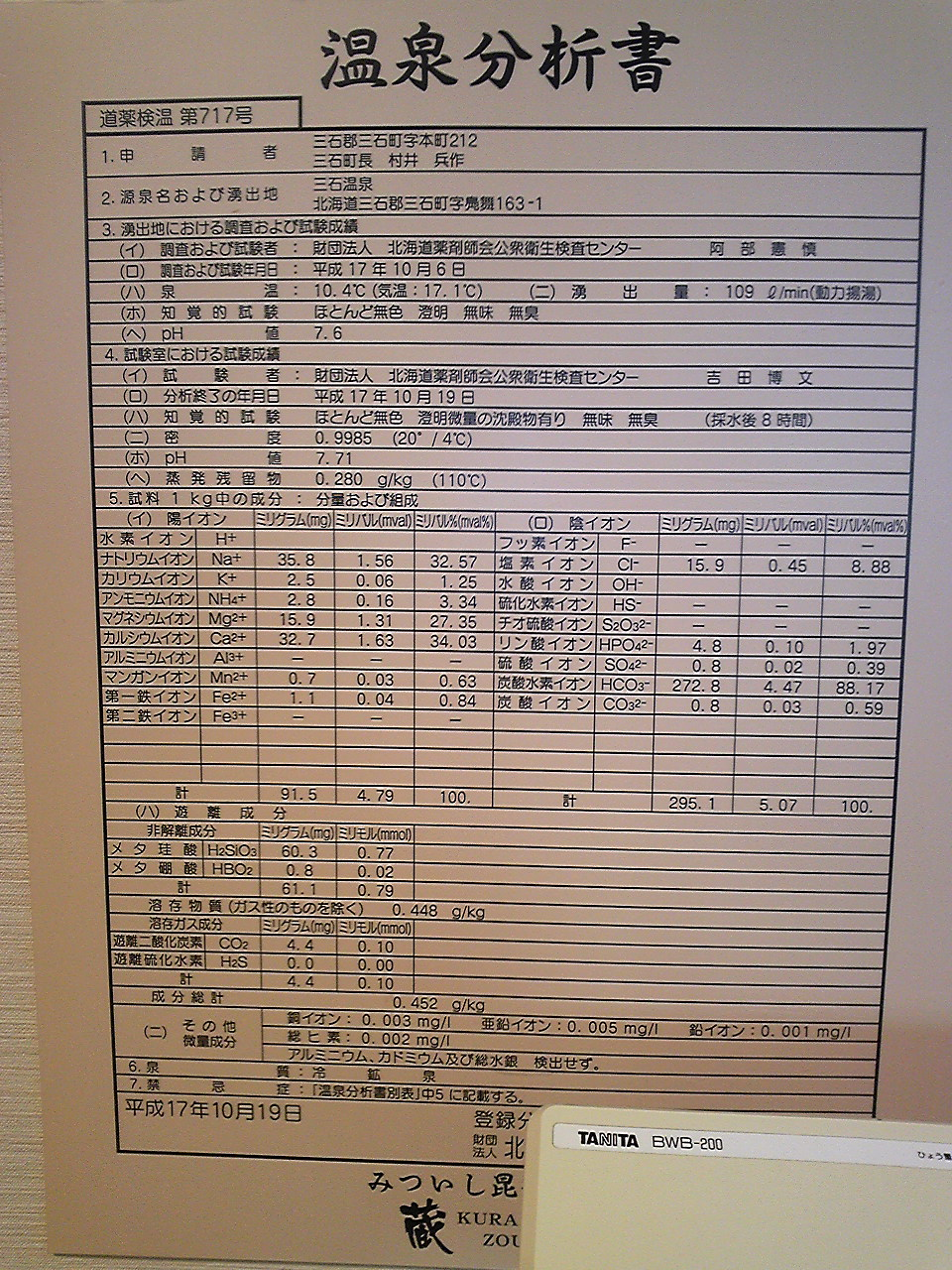 みついし昆布温泉 蔵三 温泉成分表